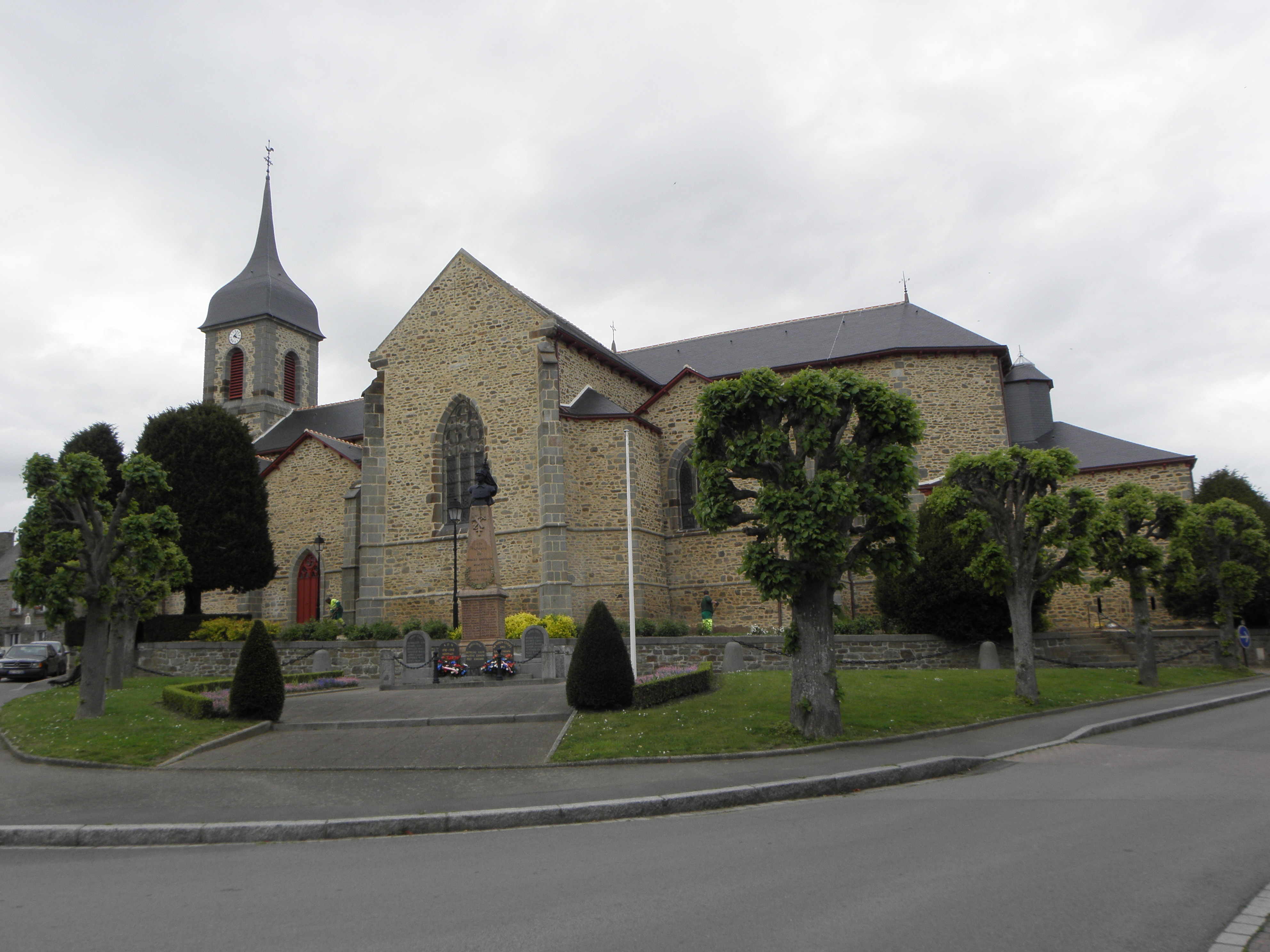 Vue méridionale de l'église Saint-Pierre de Miniac-Morvan (35).